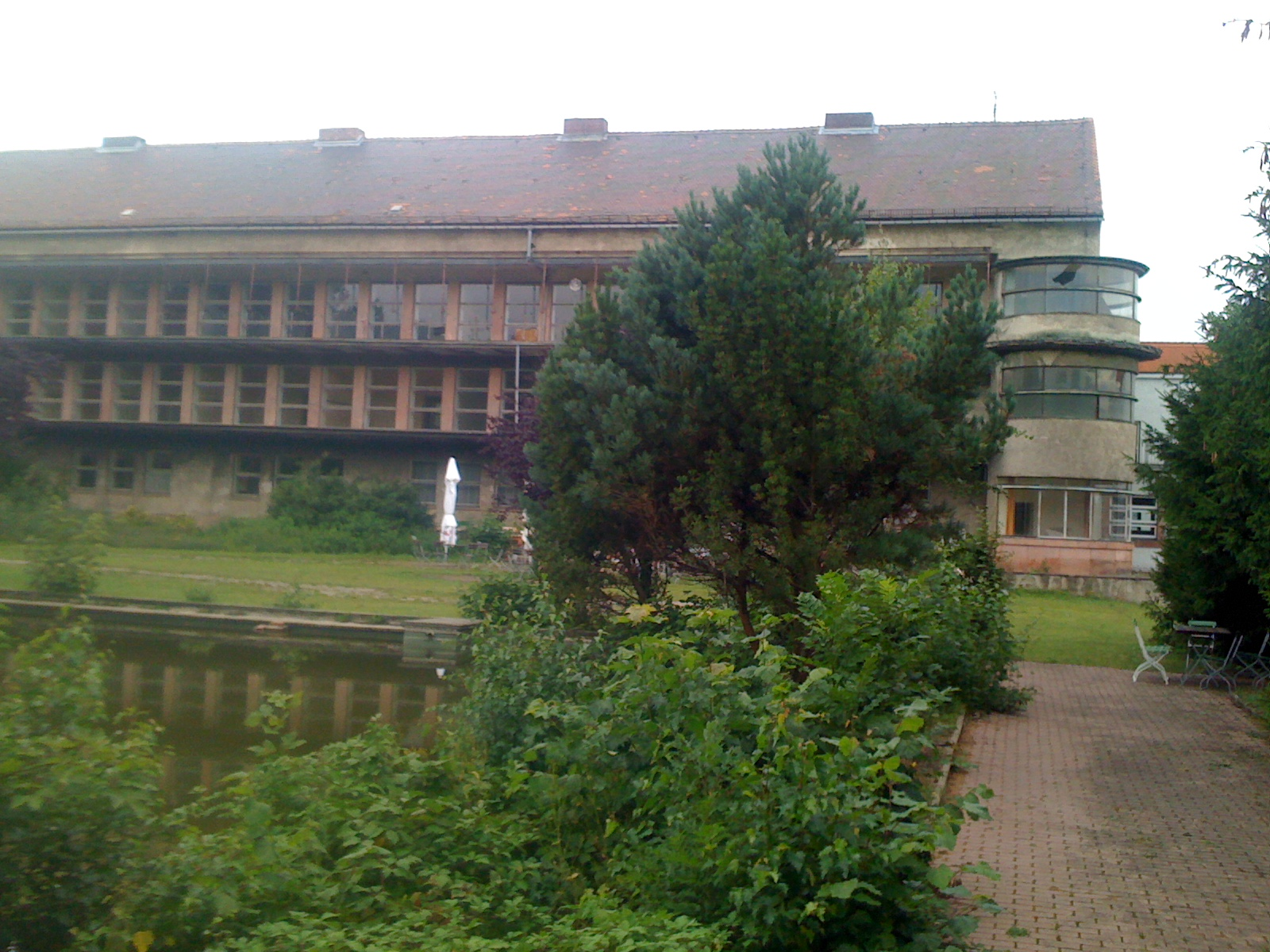 Kinderheilstätte Harzgerode Vorderansicht 2011